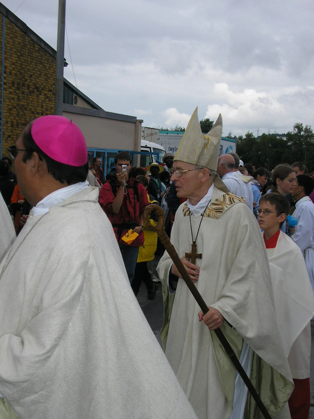 Bild: Franz Kamphaus, Bischof von Limburg (auf dem Abschlussgottesdienst der "Tage der Begegnung" anlässlich des 20. Weltjugendtages